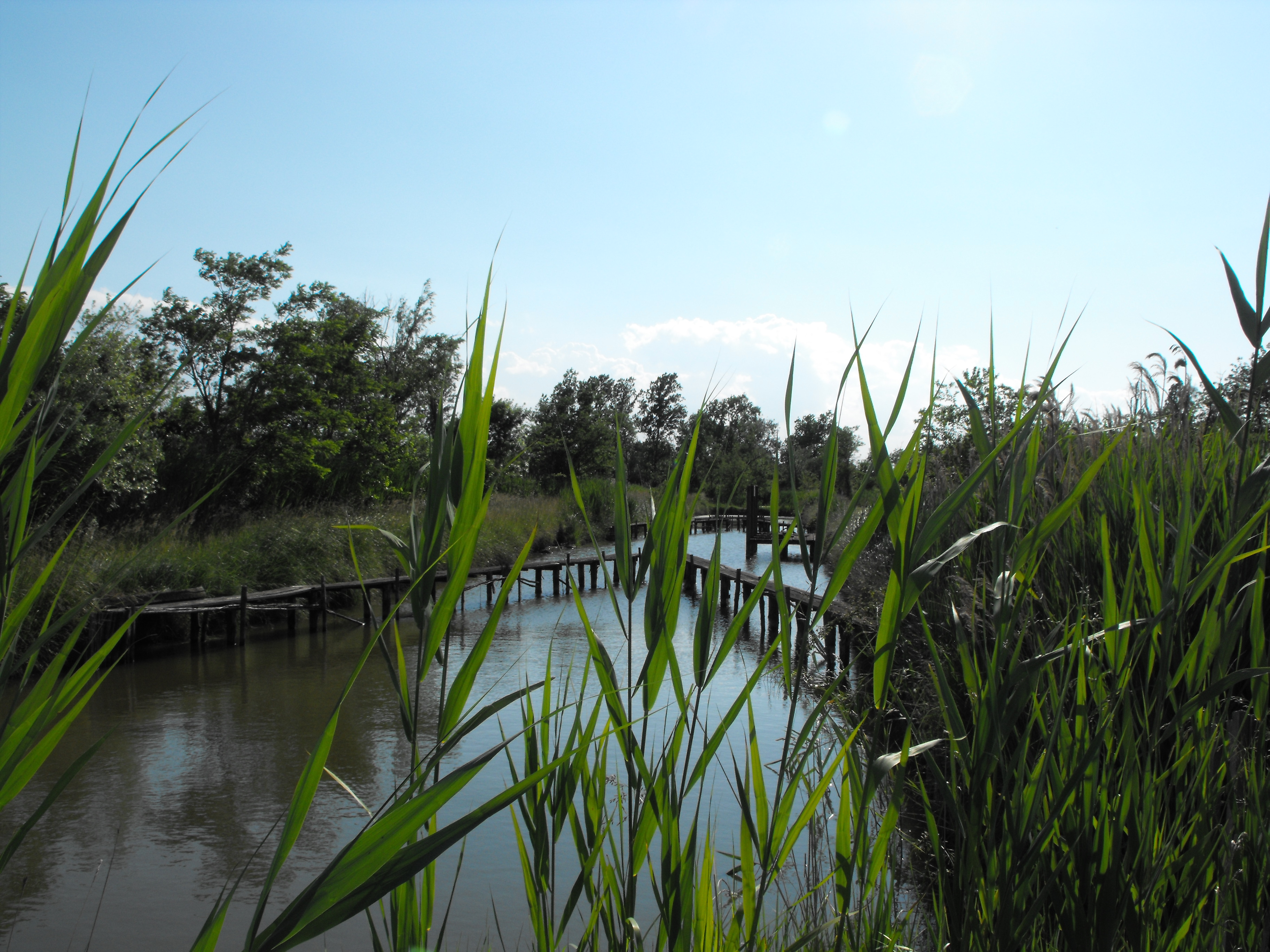 Valle Averto This is a photo of a monument which is part of cultural heritage of Italy. The authorisation for taking photos of this object was provided by the World Wide Fund for Nature Italy.